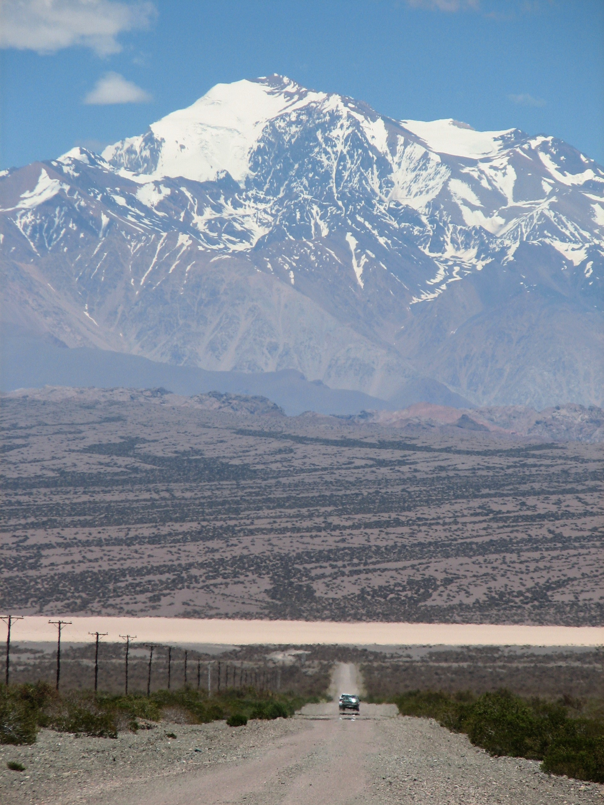 El Cerro Mercedario, desde el camino que conduce al Barreal Blanco (Pampa del Leoncito), provincia de San Juan, Argentina